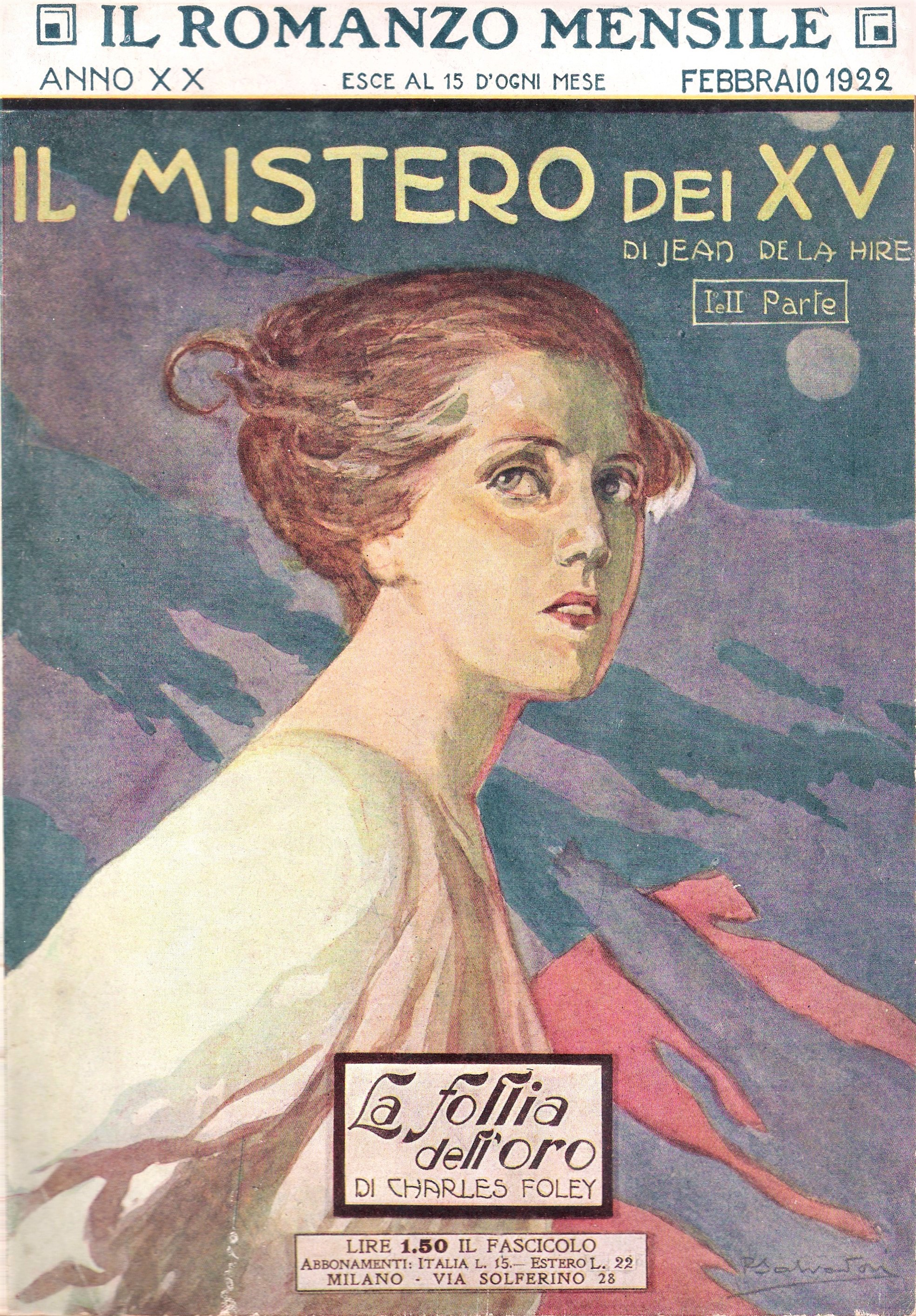 Publication italienne des Mystères des XV de Jean de La Hire en 1922.